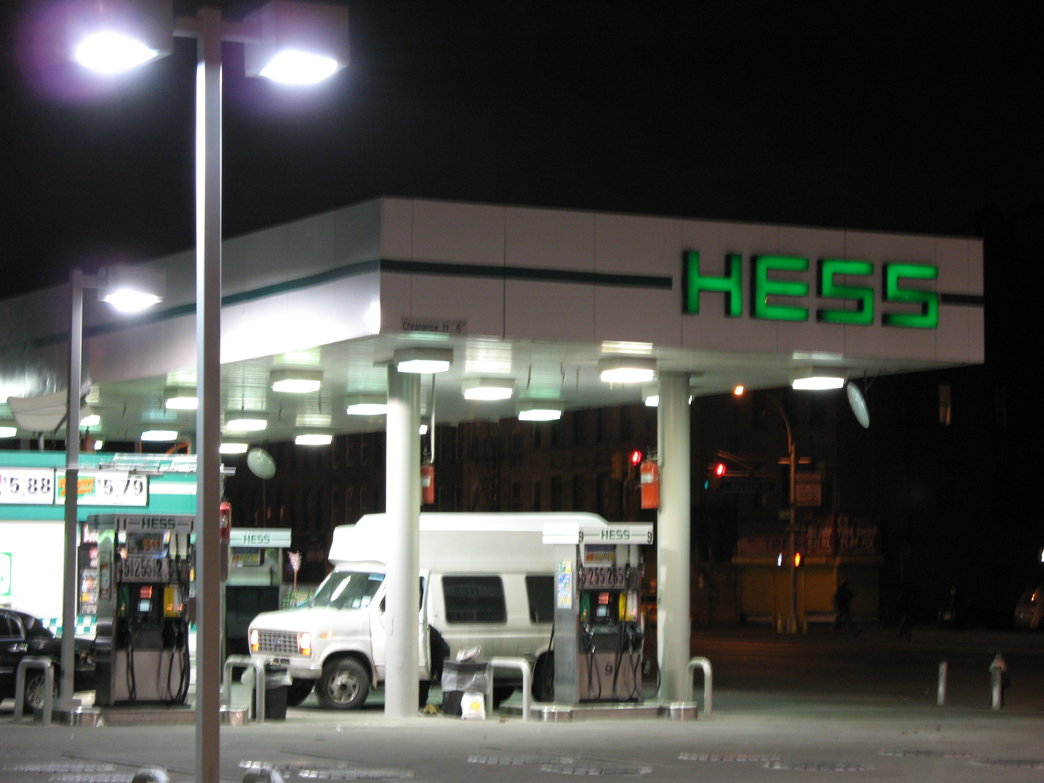 picto 071